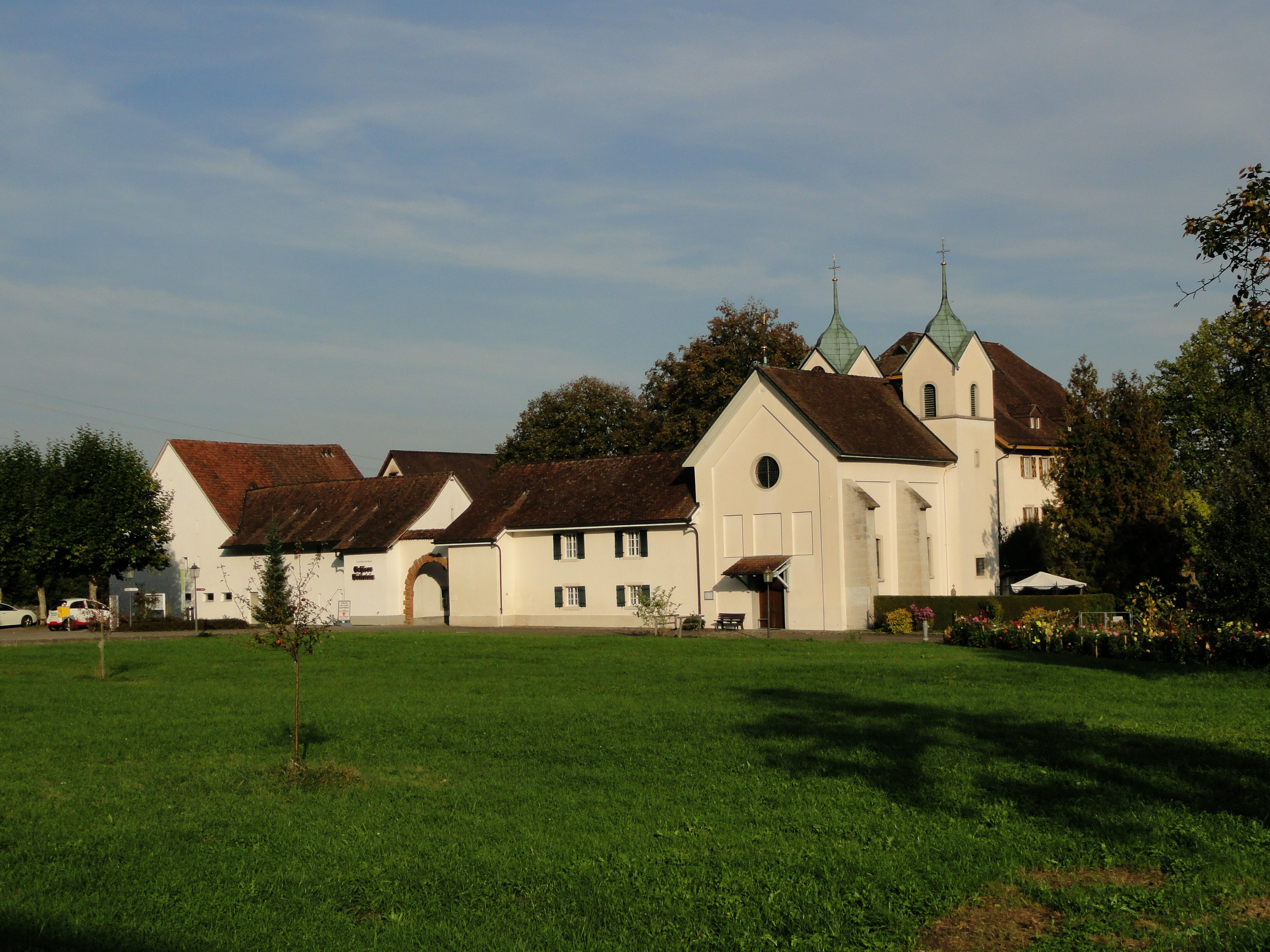 Das Schloss Böttstein im Kanton Aargau ist ein B-Objekt des KGS-Inventars.